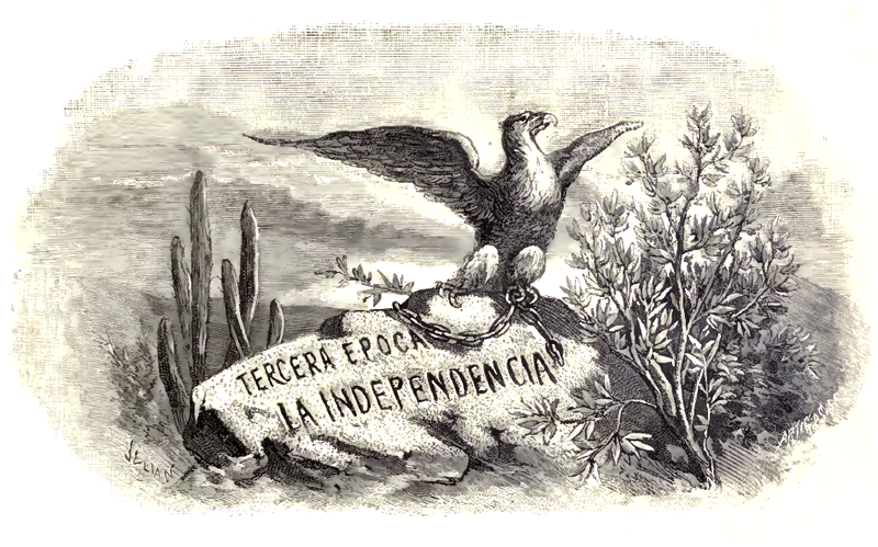 Imagen dedicado al tercer tomo de la enciclopedia México a traves de los siglos.